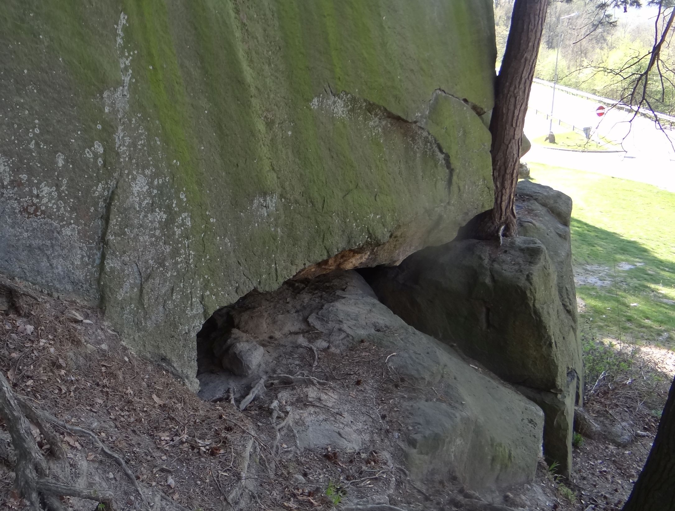 Jaskinia w Grunwaldzkiej Skale